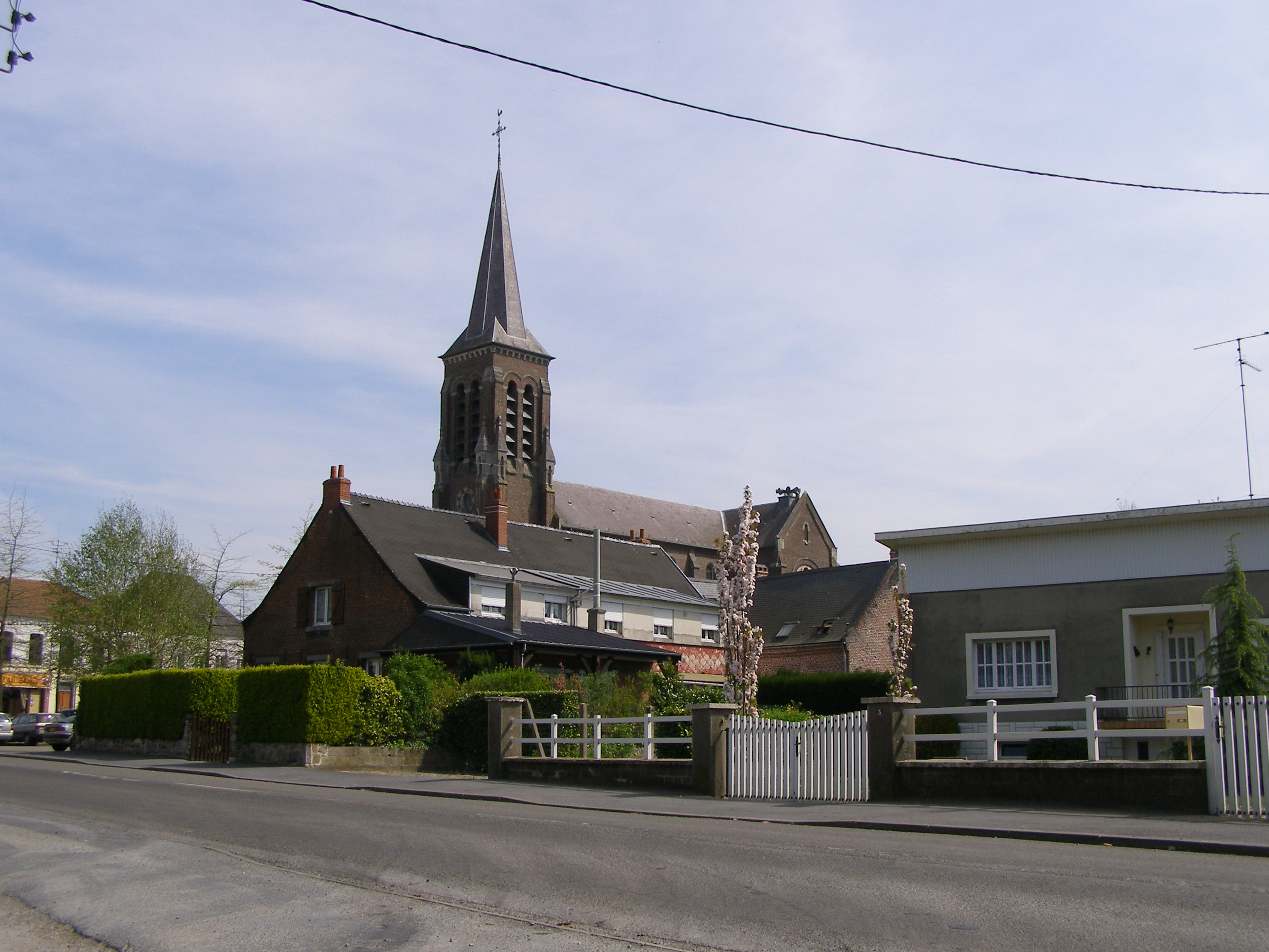 Église.